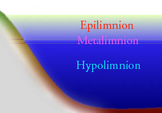 Gliederung eines Sees: abiotische Faktoren